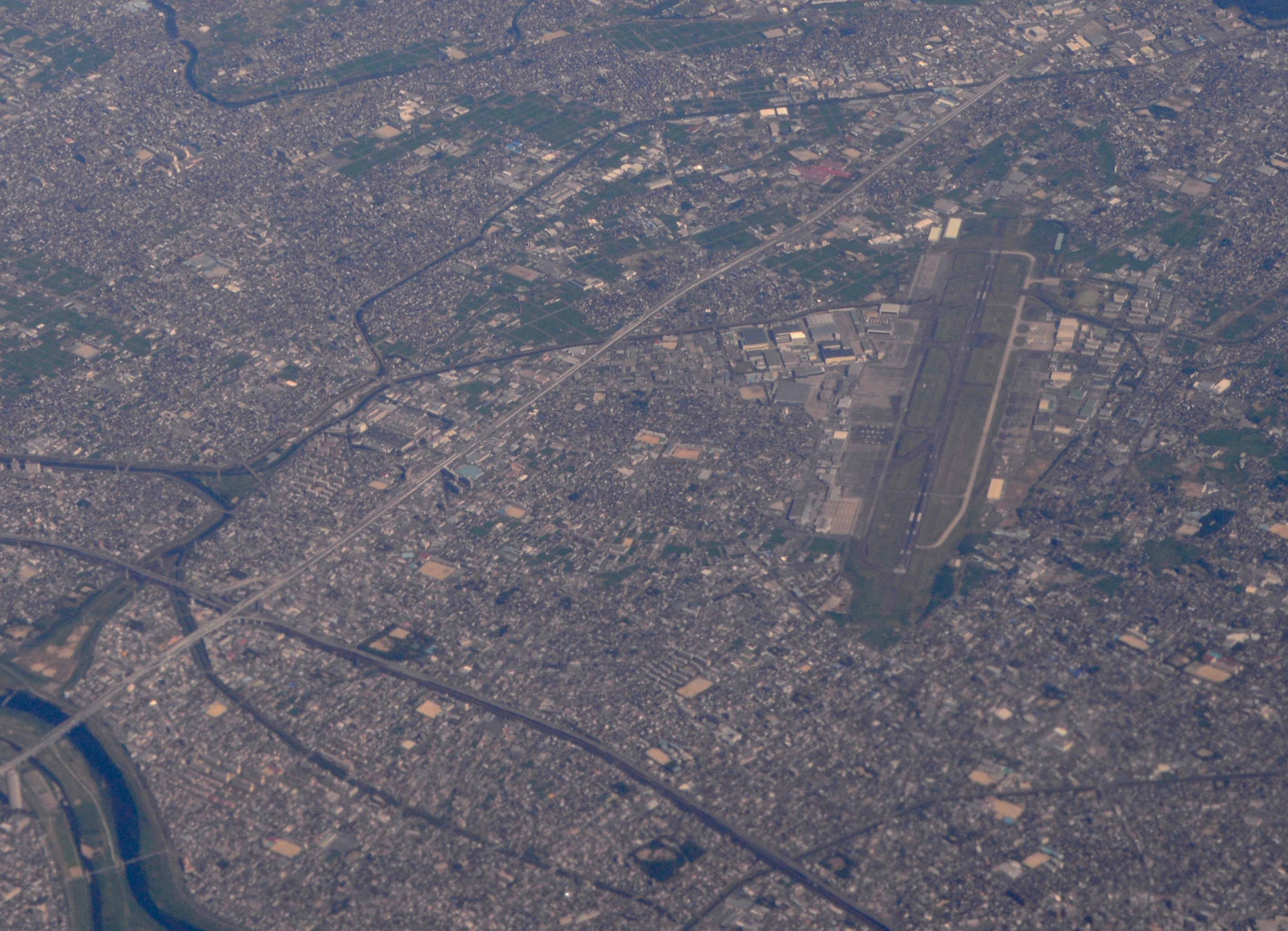 愛知県西春日井郡豊山町